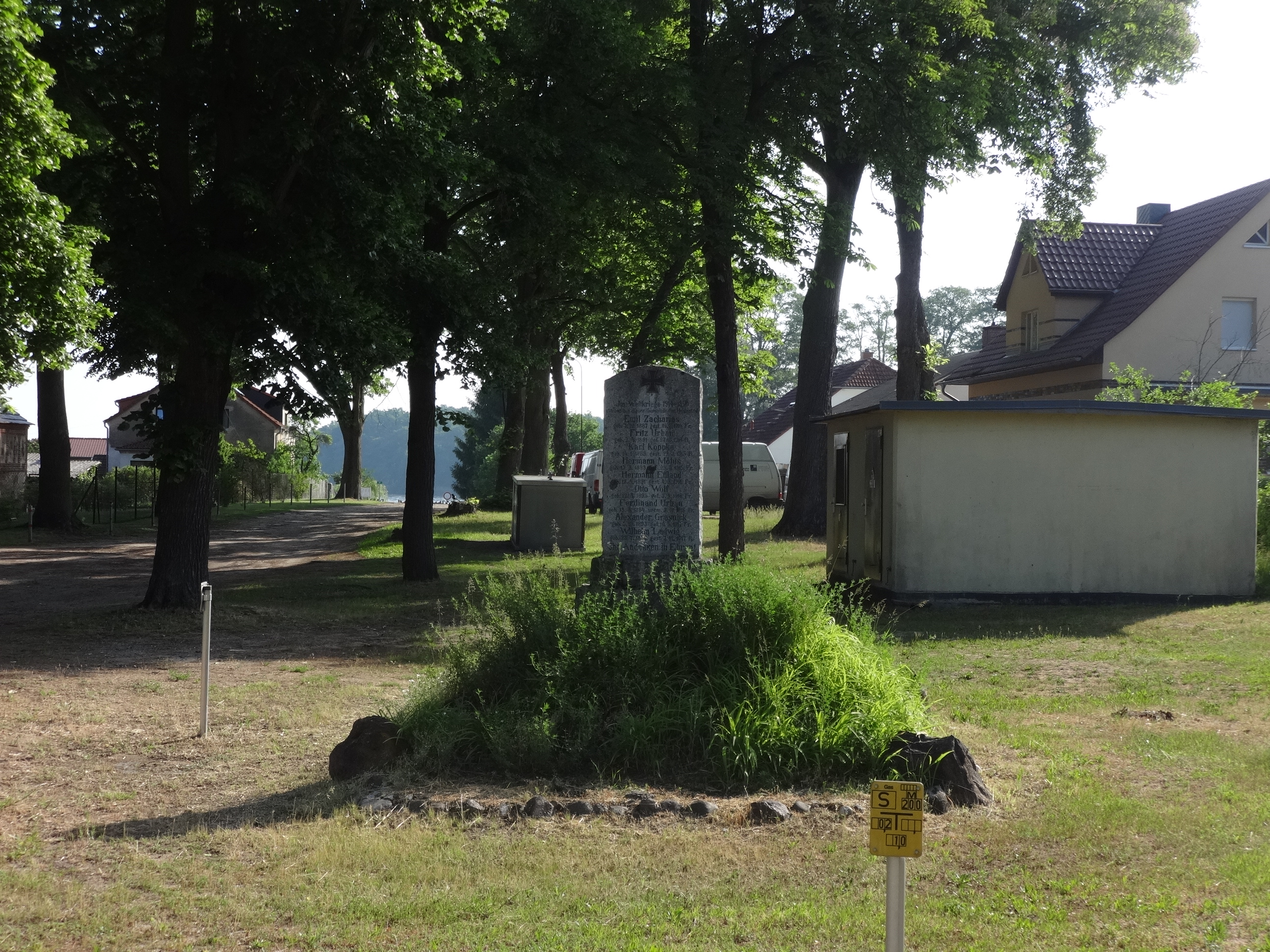 Denkmal für die Gefallenen der Weltkriege in Egsdorf, ein Ortsteil von Teupitz in Brandenburg